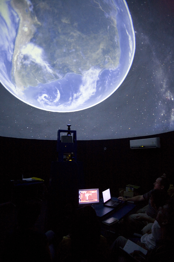 Parte interna da cúpula do planetário da CCTECA Galileu Galilei